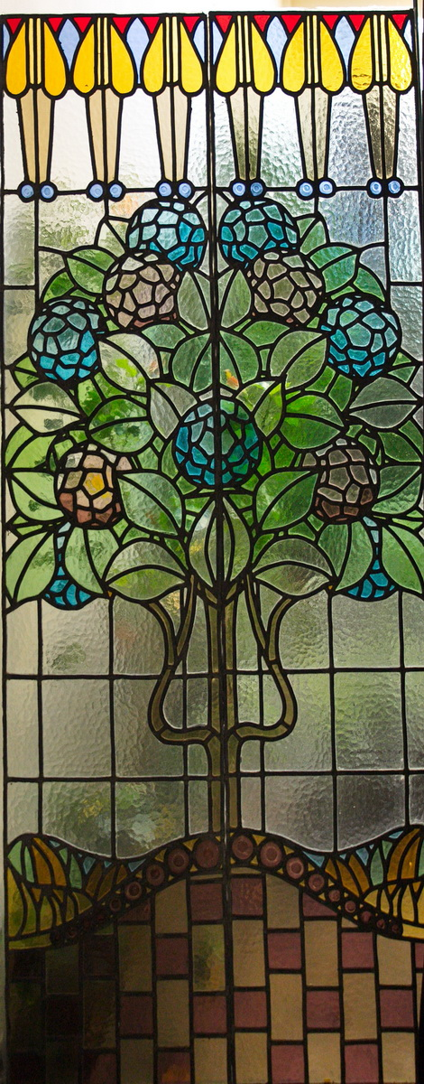 Vitrall de mostra, obra d'Eusebi Arnau, per a la Casa Lleó Morera (Barcelona) de Lluís Domènech i Montaner (1902). La maqueta es conserva a la casa-museo de Domènech i Montaner a Canet de Mar.